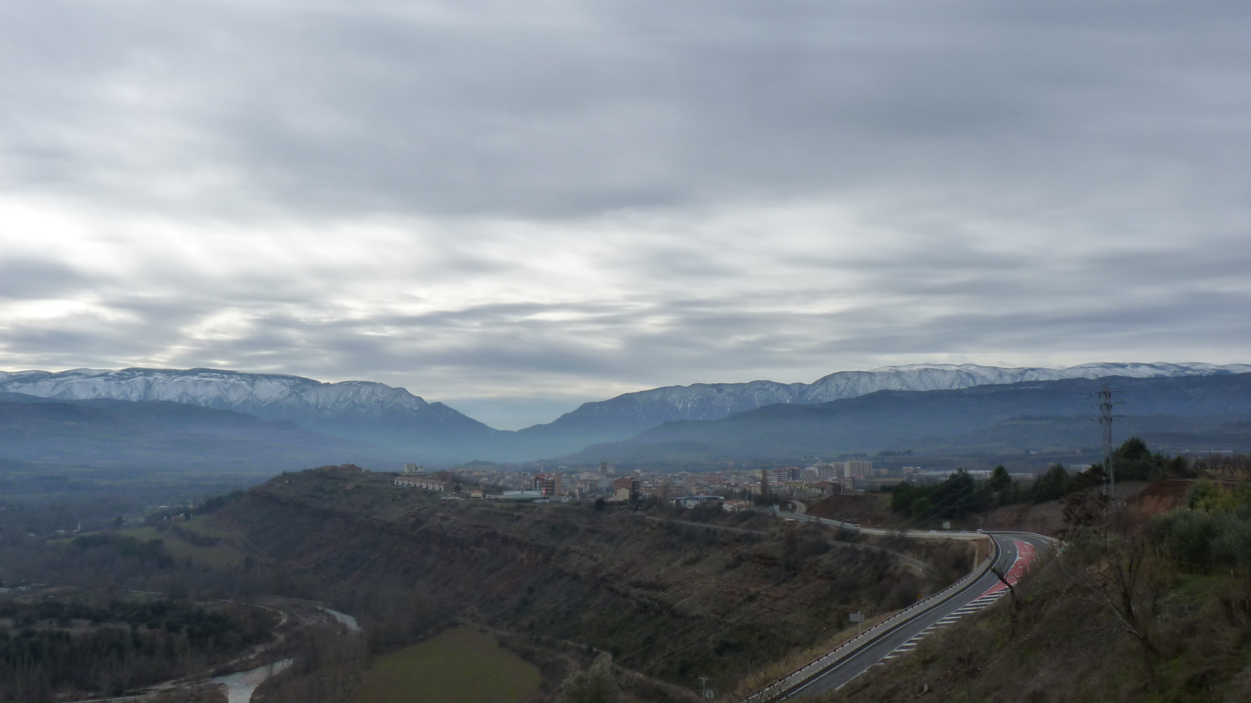 Serra de Mont-sec vist des de Talarn